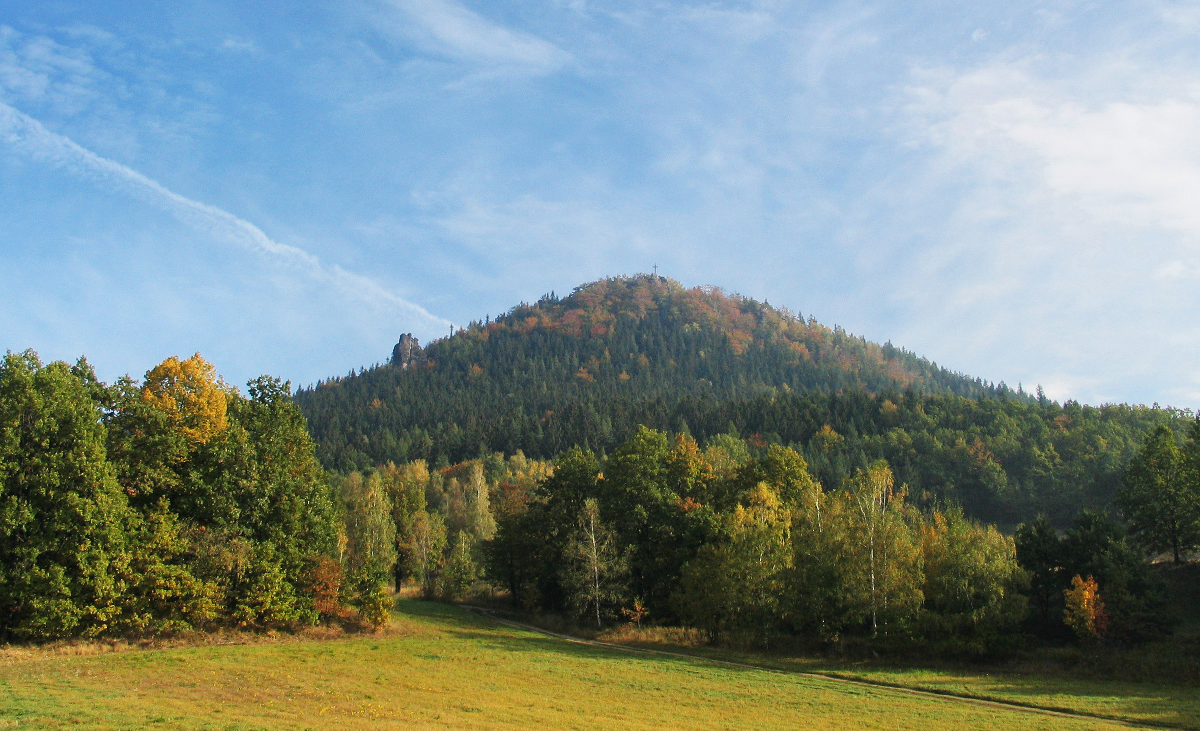 Mount Krzyżna Góra, Rudawy Janowickie Mountains, Poland